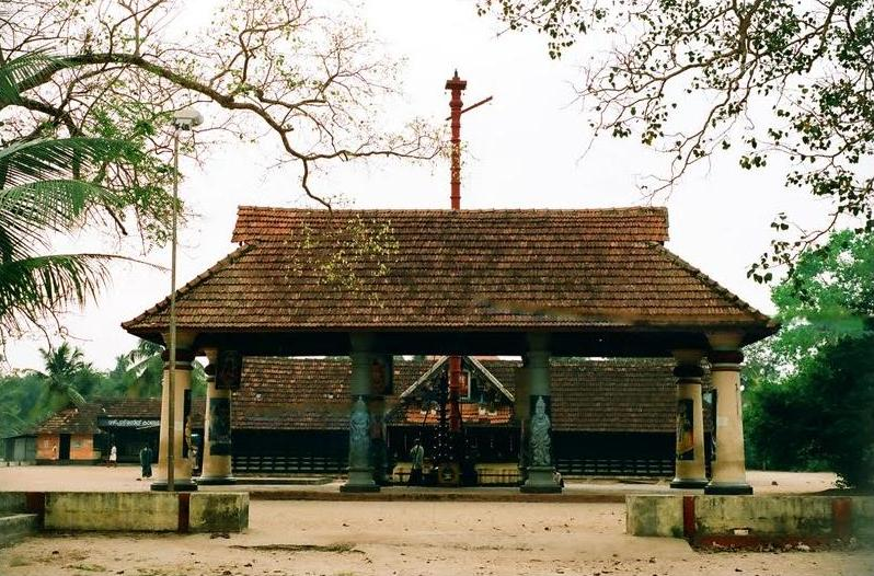 നാല്പത്തെണ്ണീശ്വരം ക്ഷേത്രം